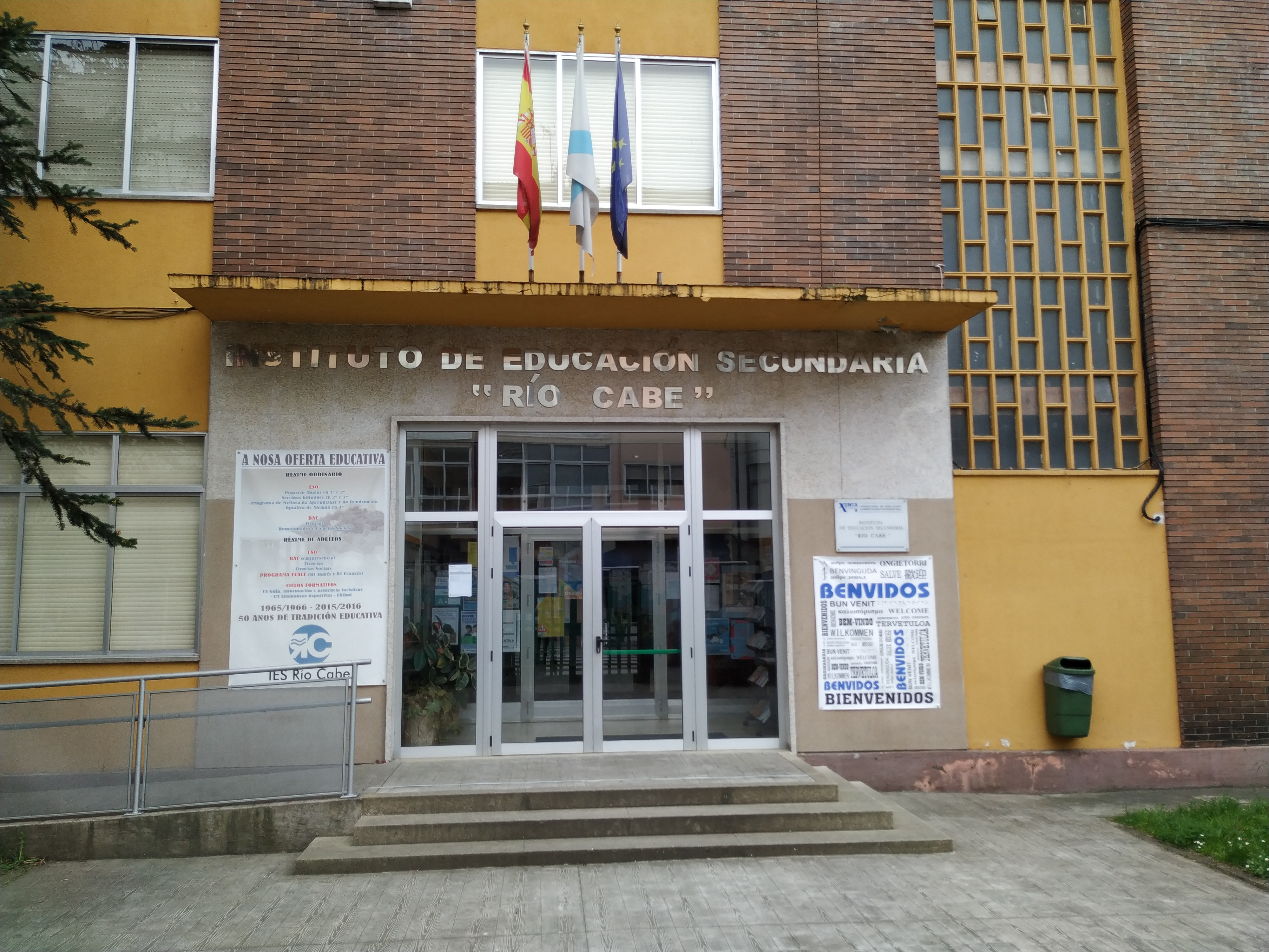 Vista frontal